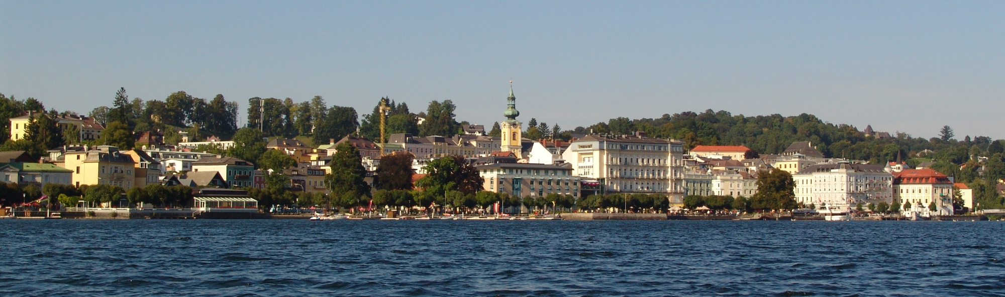 Panorama Gmunden am Traunsee vom See fotografiert, von Walter Hochauer [1]